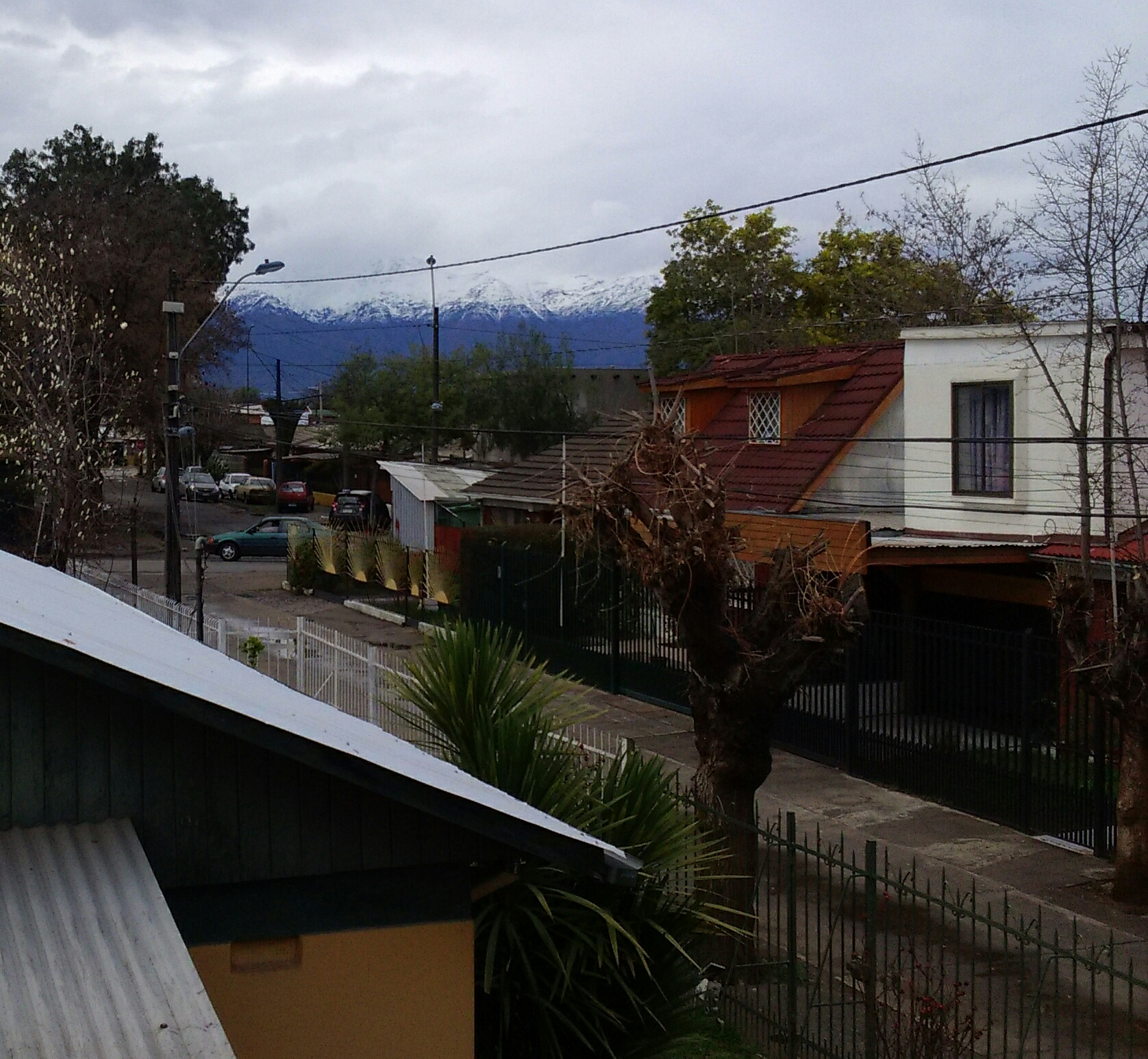 Vista de "la majestuosa blanca montaña" desde la comuna de Estación Central en pleno invierno.